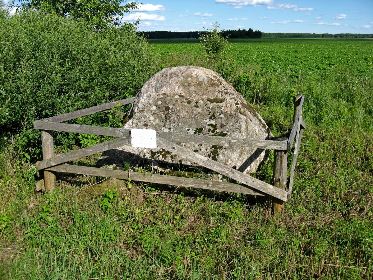 Даўнары. Вялікі камень даўнарскі